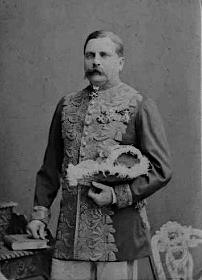 Рафаэль фон Хаартман